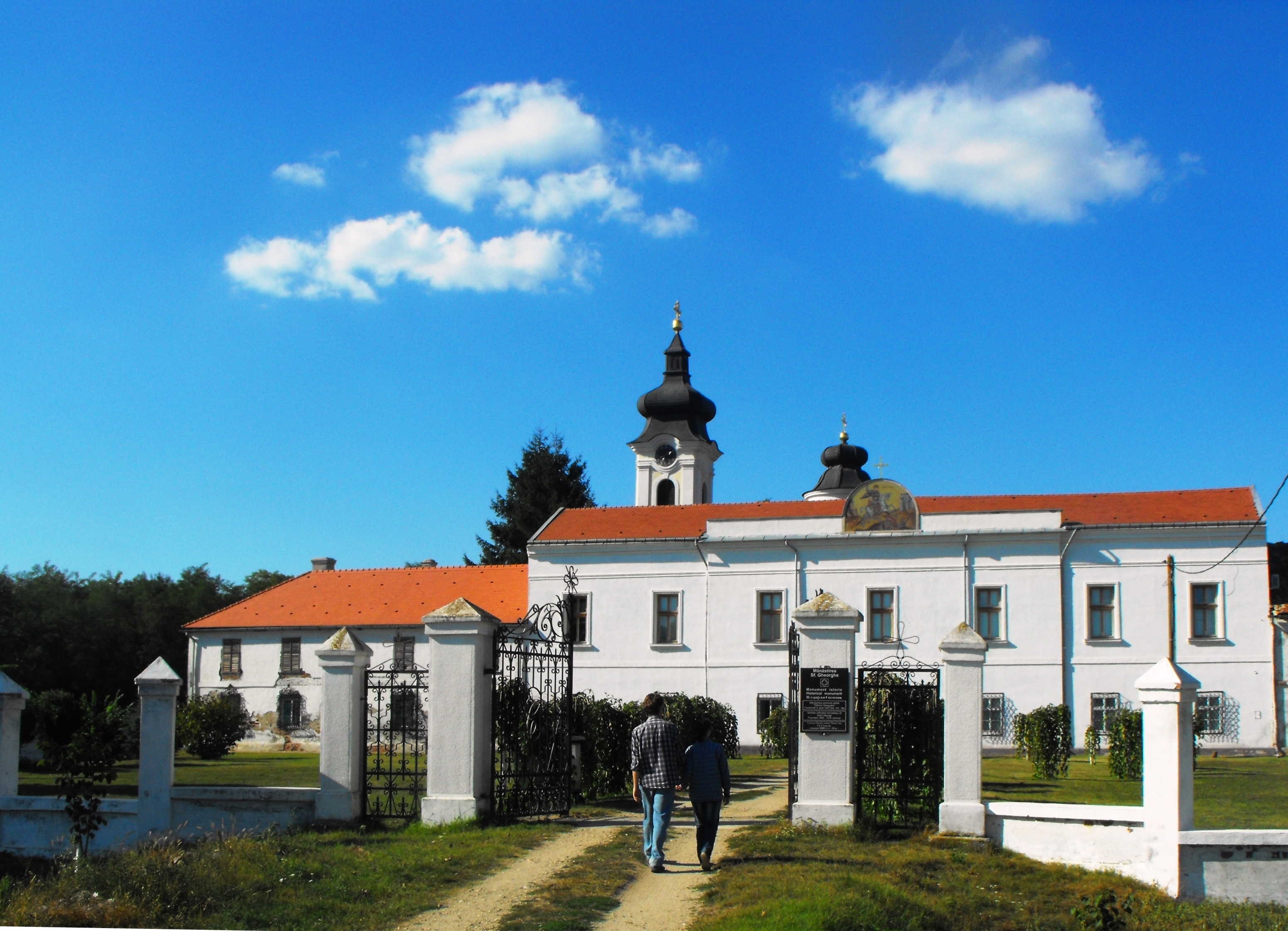 Mânăstire ortodoxă sârbă ridicată de Despotul Brancovici în 1484 după înfrângerea de la KosovoPolje; adăposteşte moaşte UNICE: capul şi lanţurile Sfântului Gheorghe